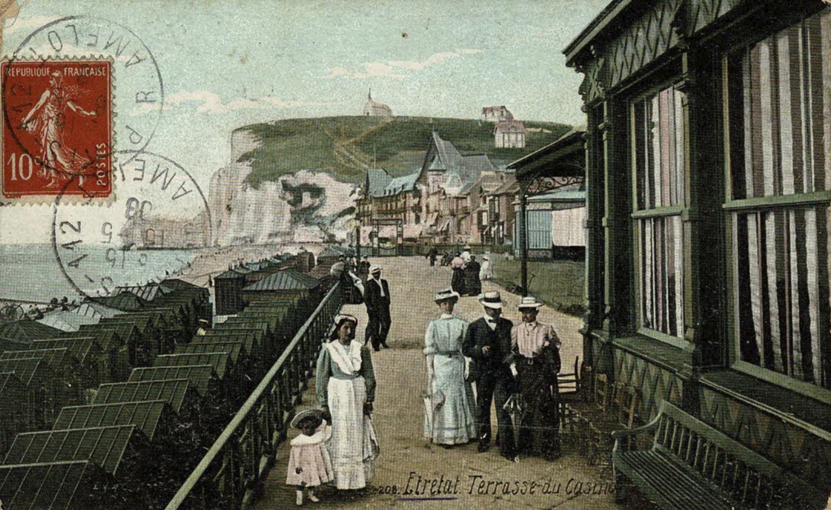 Набережная Этрета